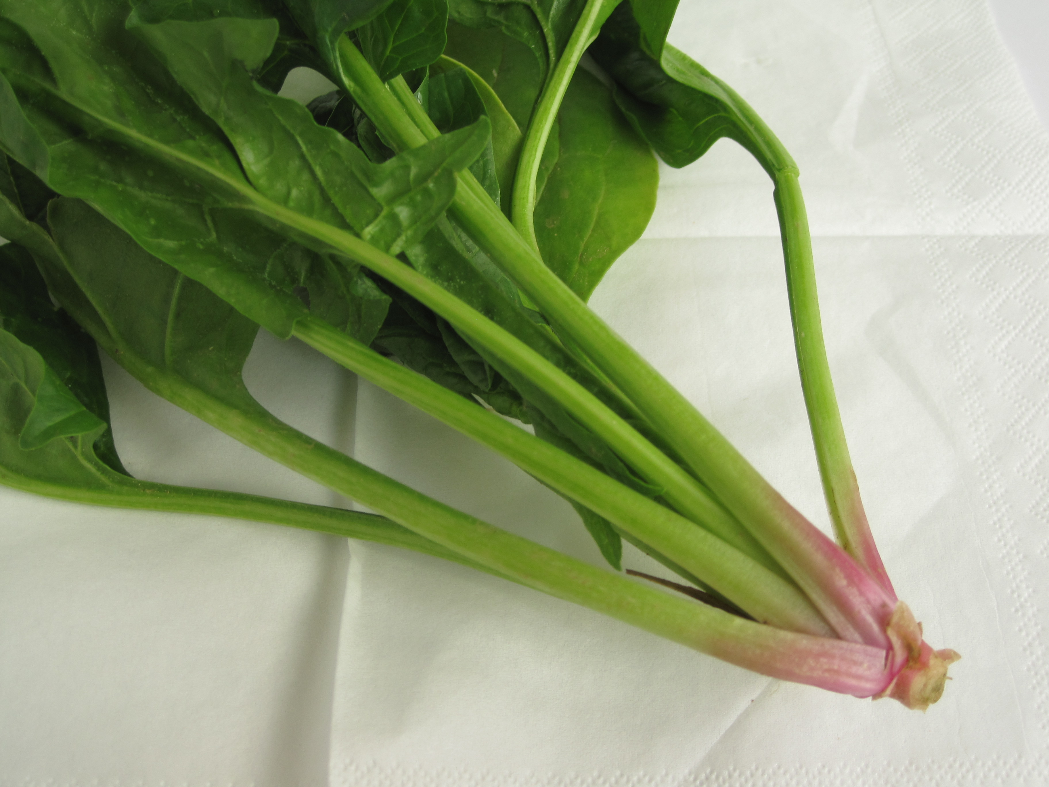 Spinat (Wurzelspinat)